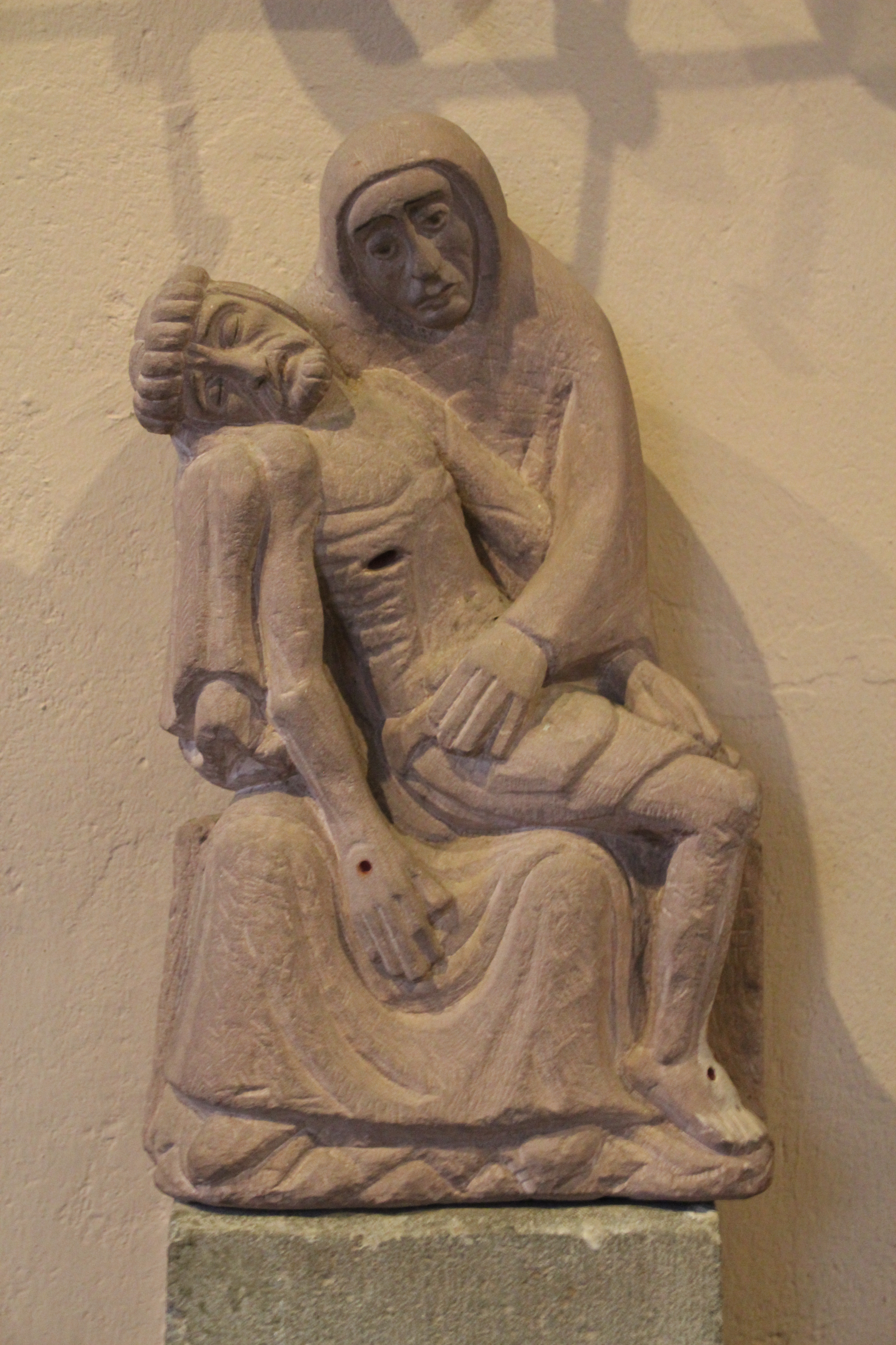 Pietà aus Stein in Klein St. Arnold in Arnoldsweiler von Josef Jansen, 1973.